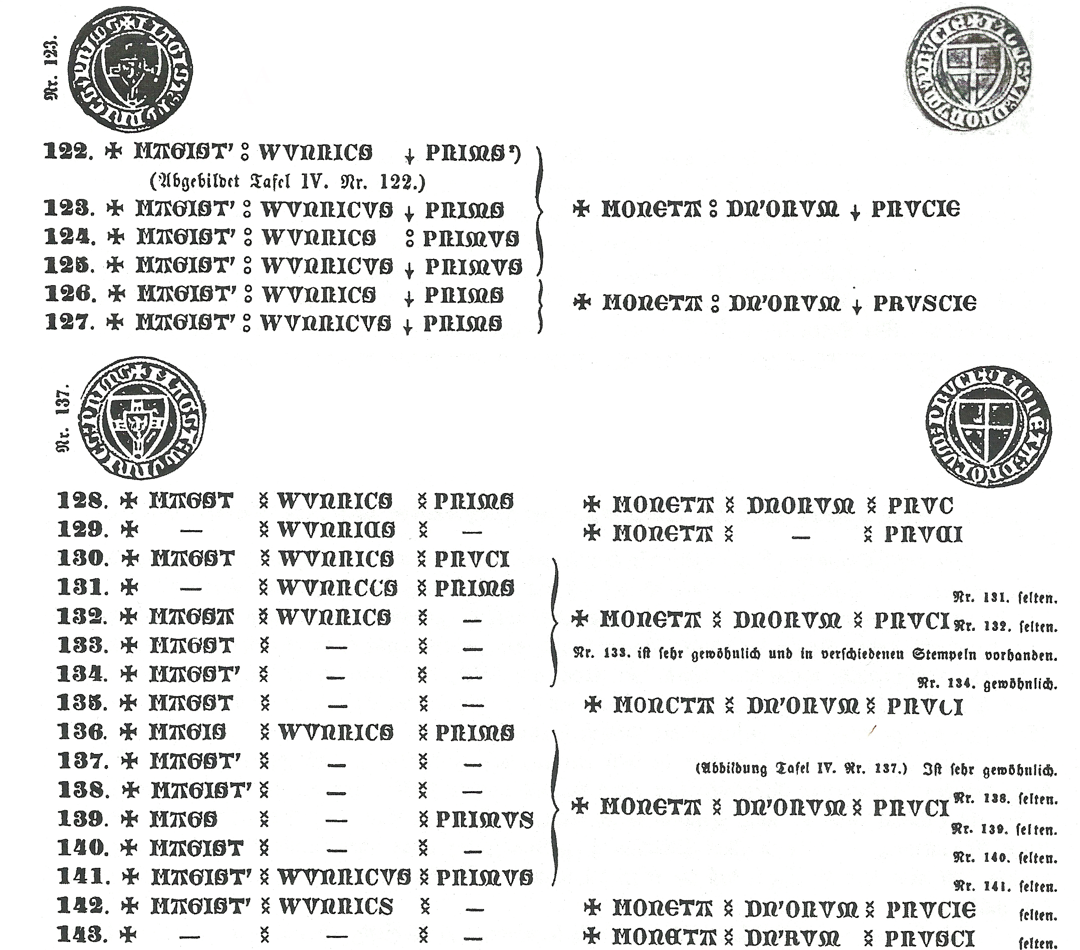 Monety_krzyżackie_1331-1382.